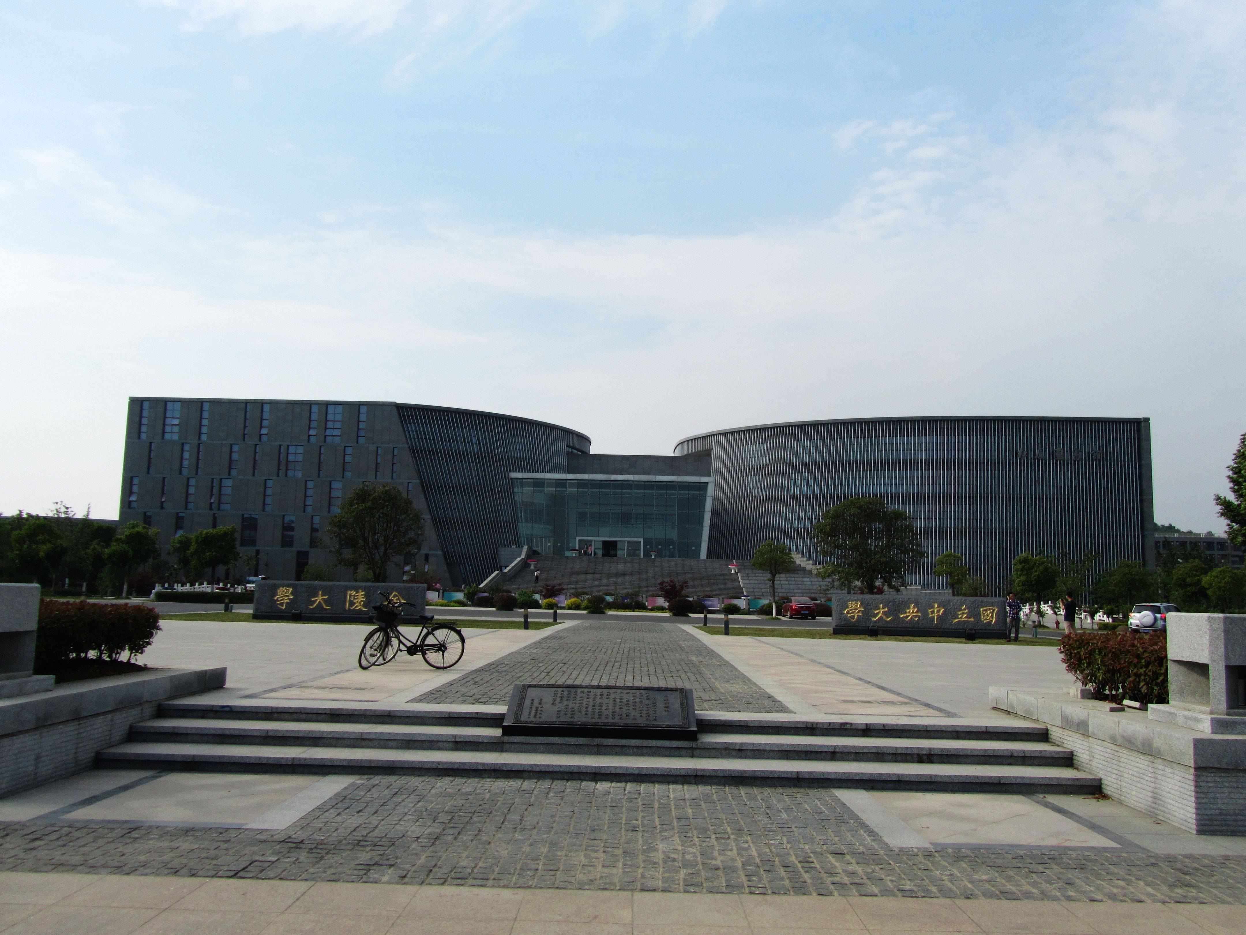 南京大学仙林校区杜夏图书馆及二源广场。